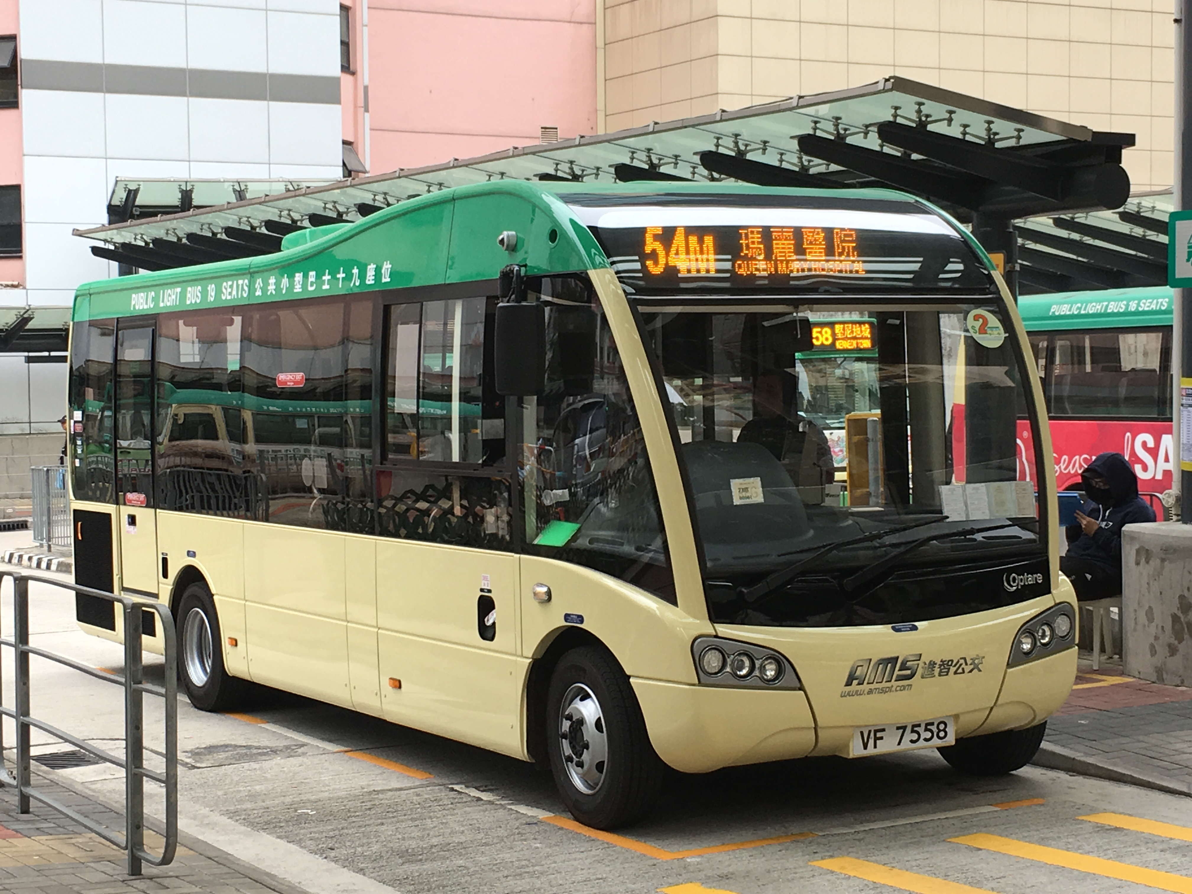 This photo is taken in Kennedy Town Station.